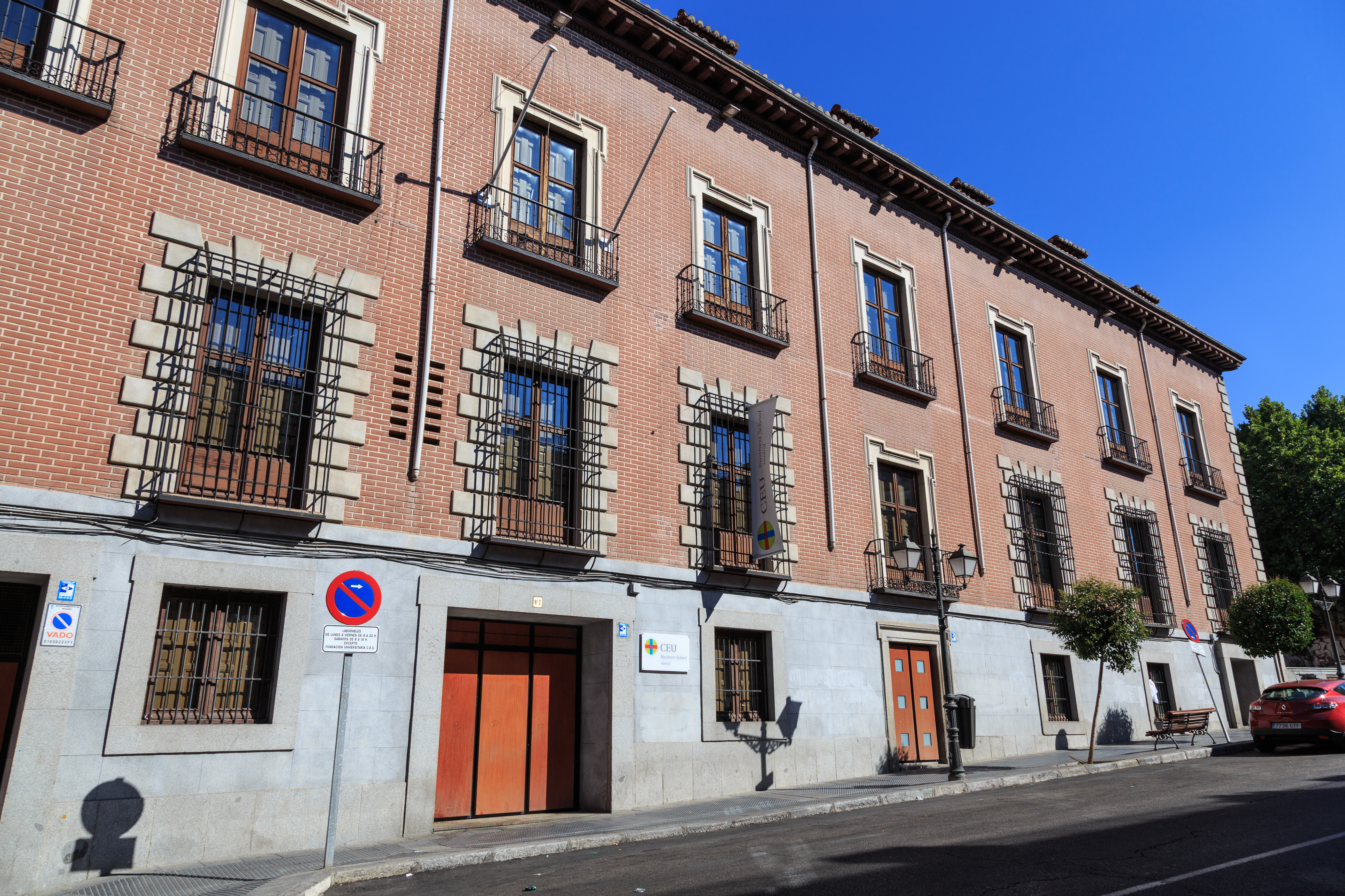 Casa palacio del Duque del Infantado. Calle de Don Pedro, 1, Madrid. Fachada sobre la carrera de San Francisco. 01S.